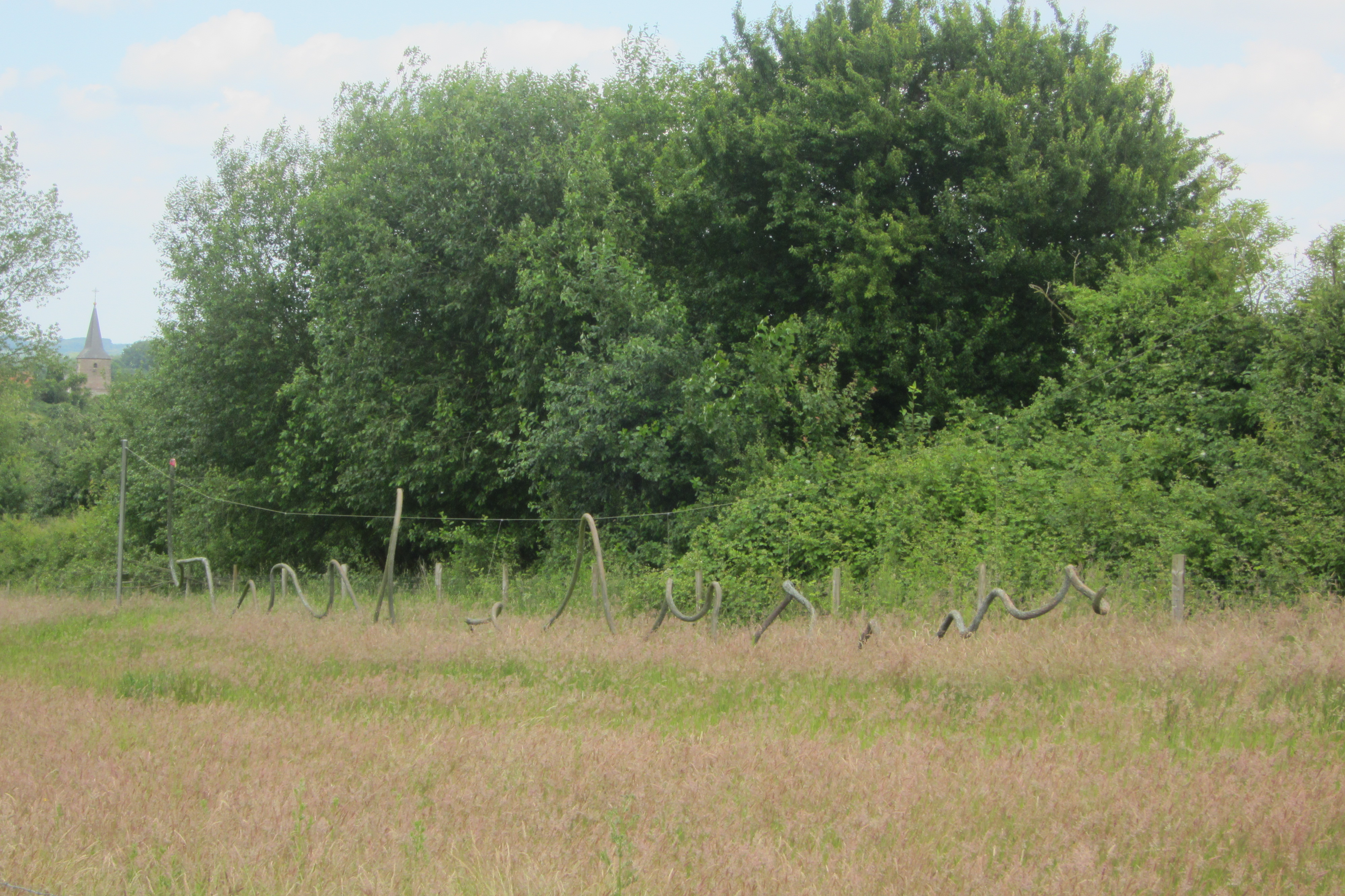 Fred Eerdekens, Twijfelgrens, te Borgloon (Belgisch-Limburg)